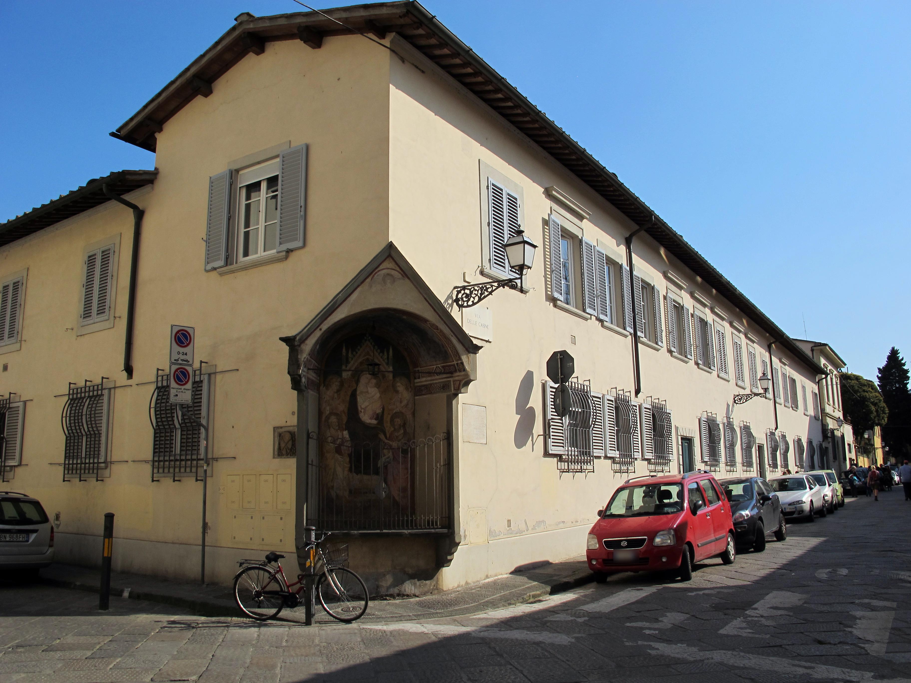 Via delle casine, tabernacolo dei tintori